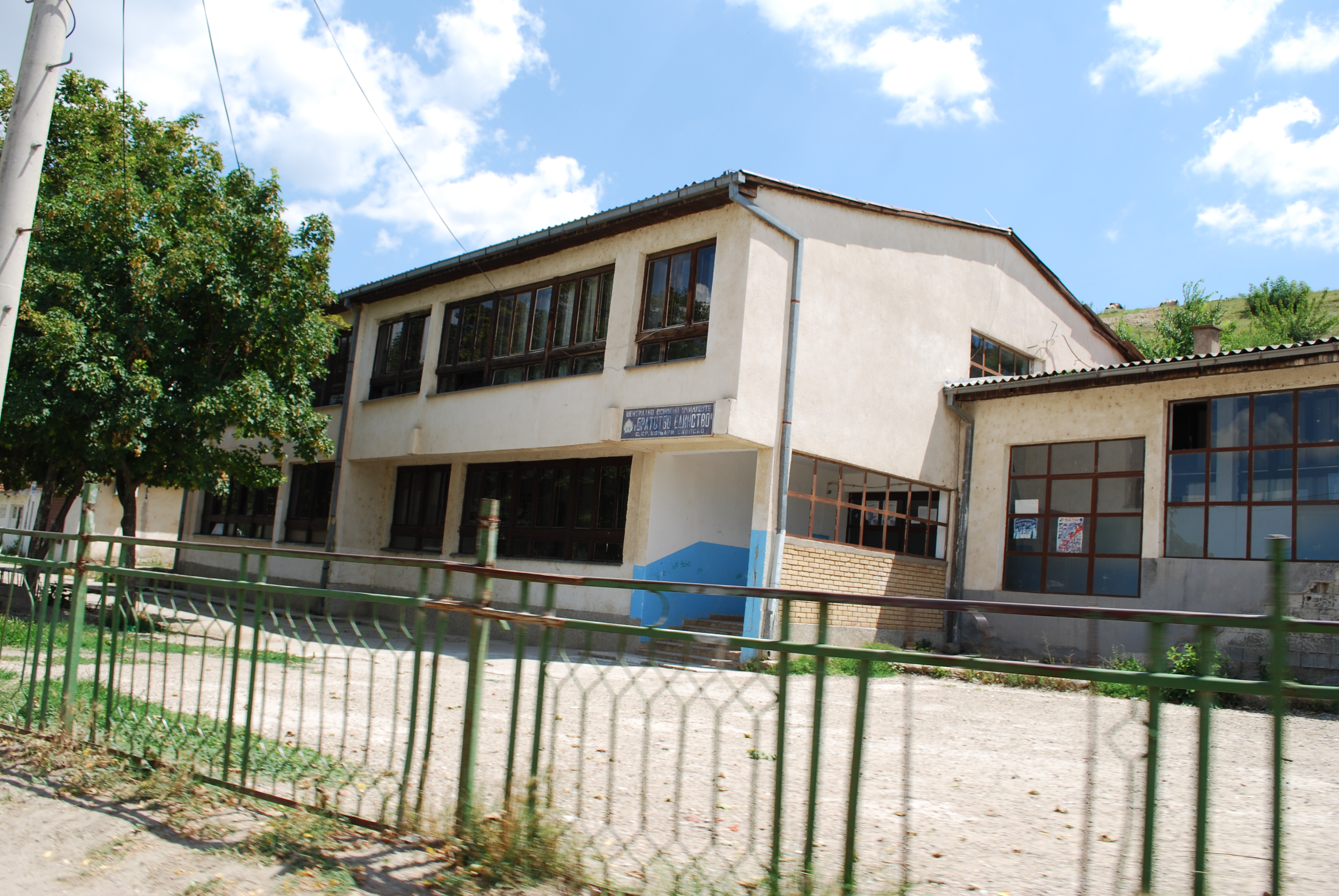 ЦОУ „Братство-Единство“ -Средно Коњари, Скопје, Македонија